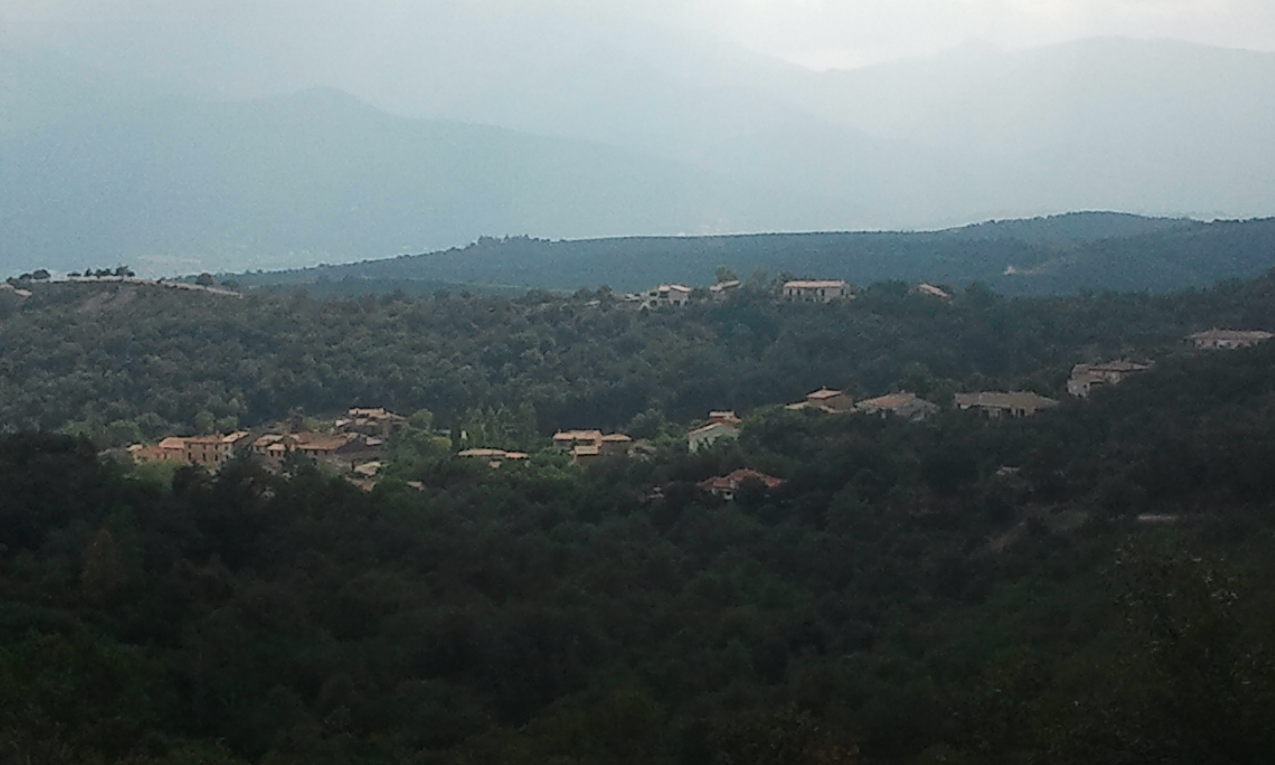 Vue générale de Vivès